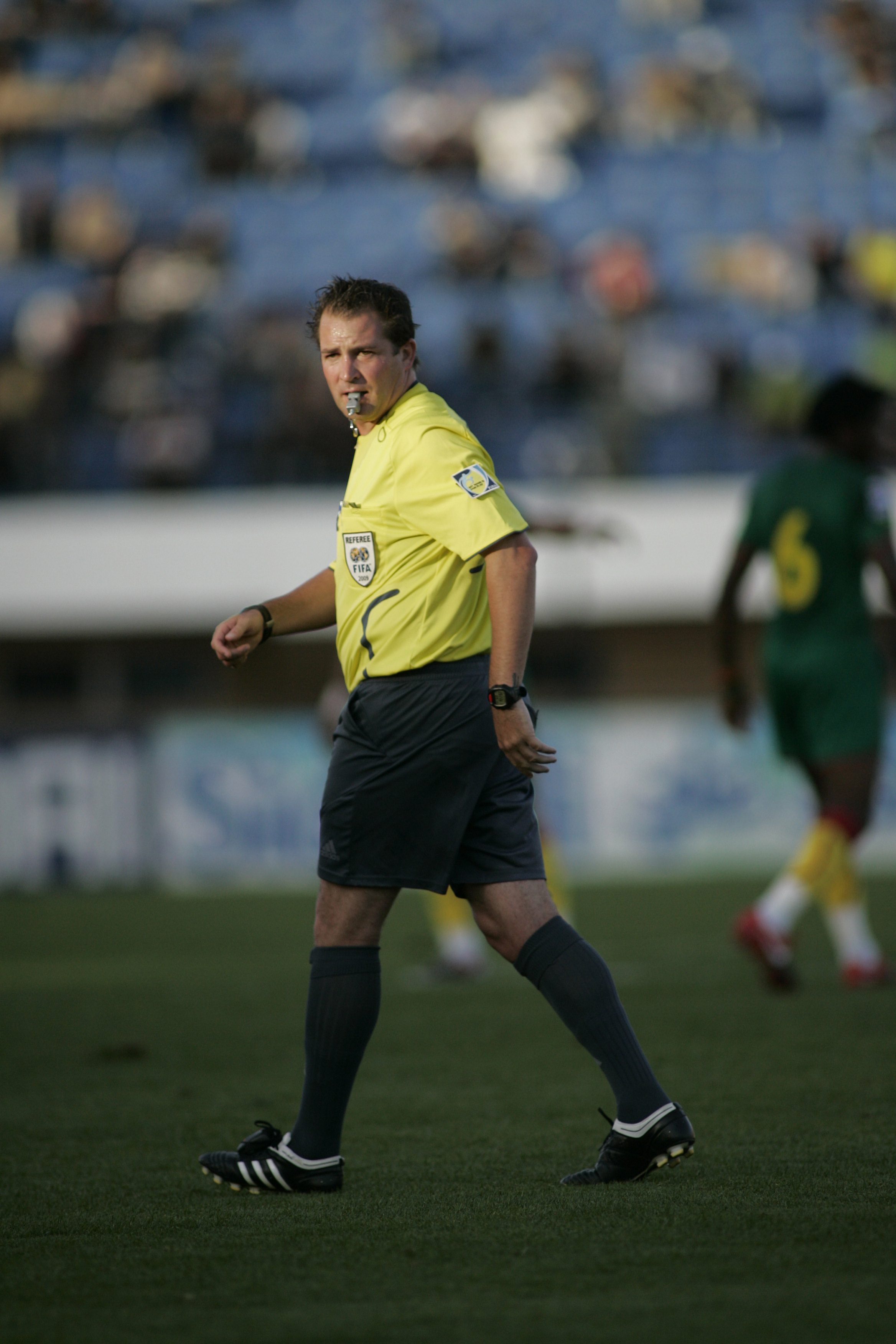 Match Maroc - Cameroun